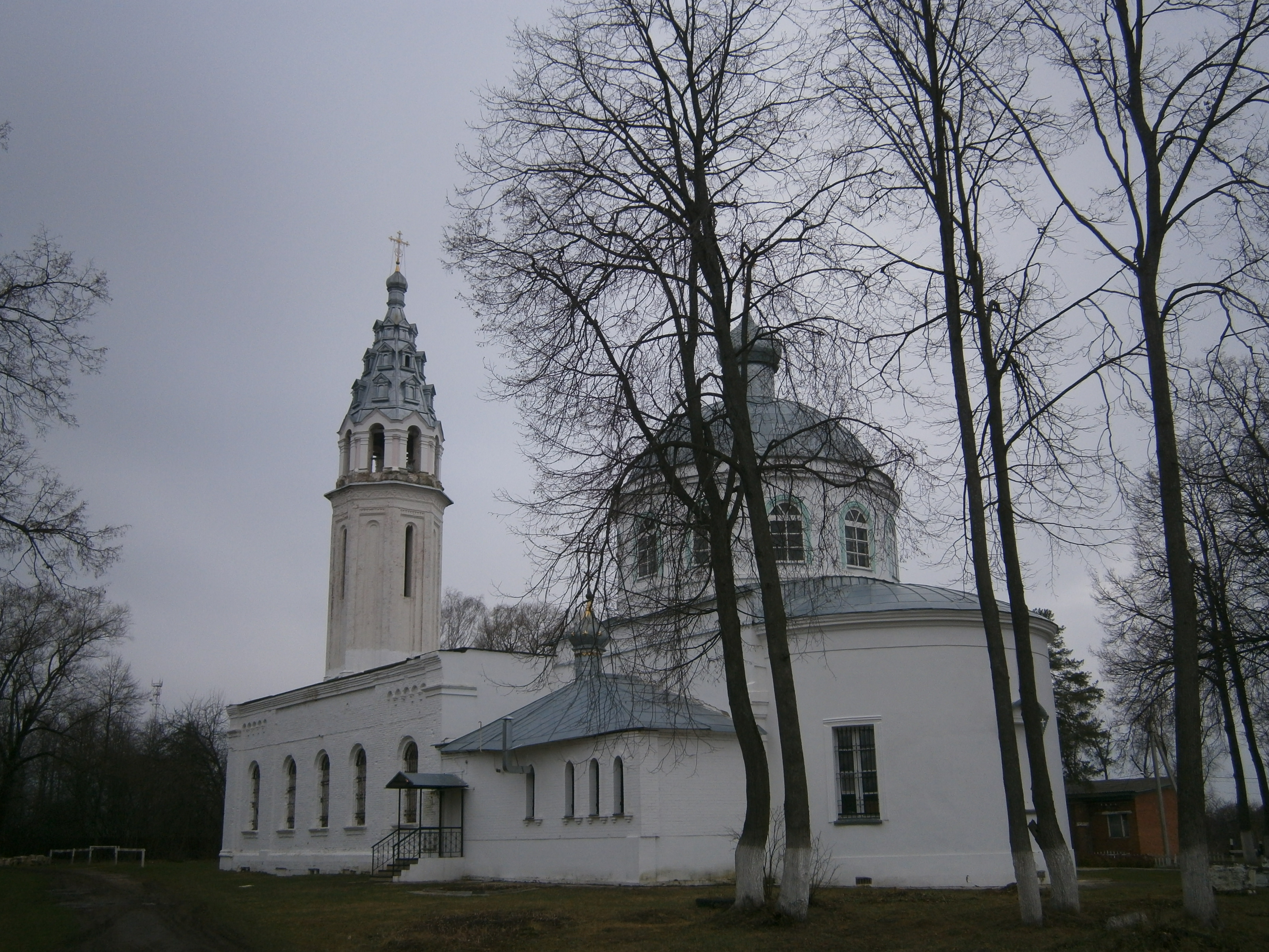 Церковь в деревне Захарово, Клинский район, Московская область.